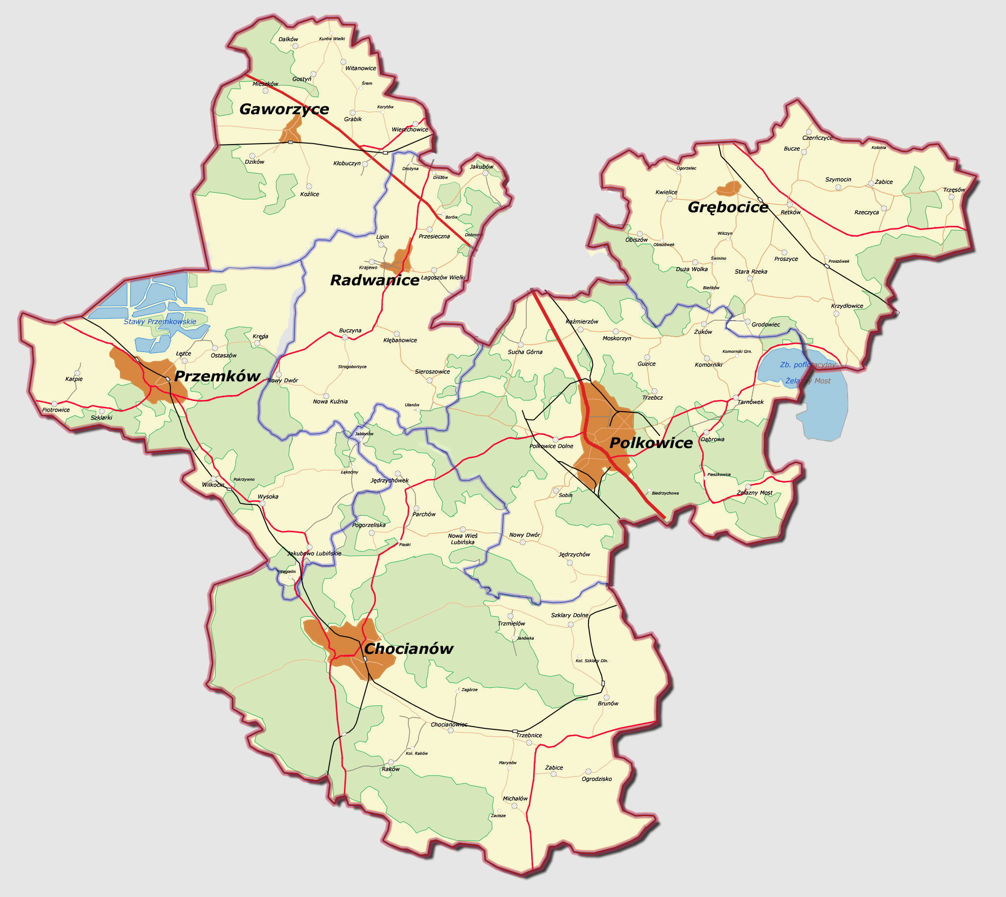 Mapa powiatu polkowickiego